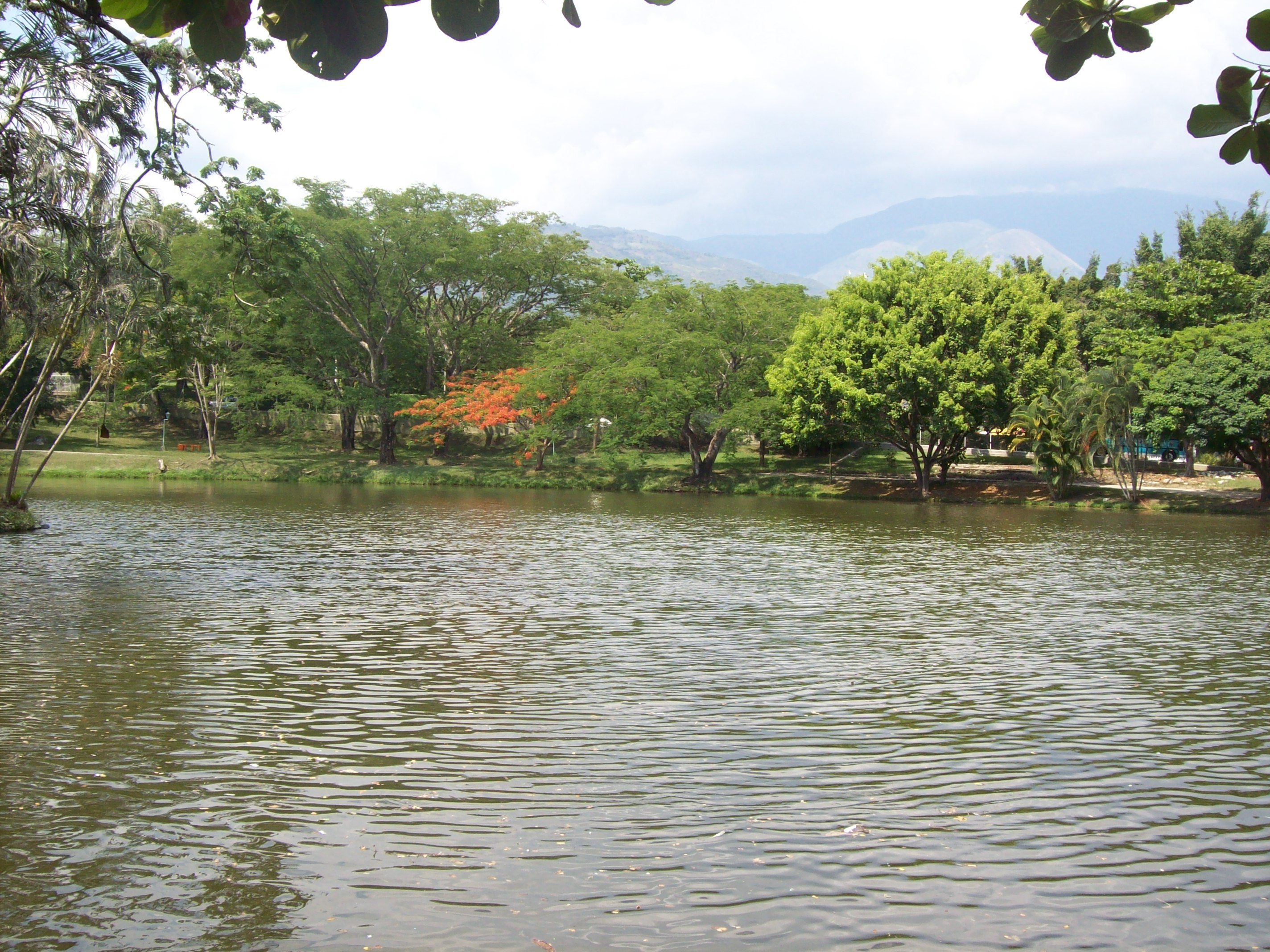 Aspecto típico de un lago en el Occidente AntioqueñoSan Jerónimo (Antioquia)